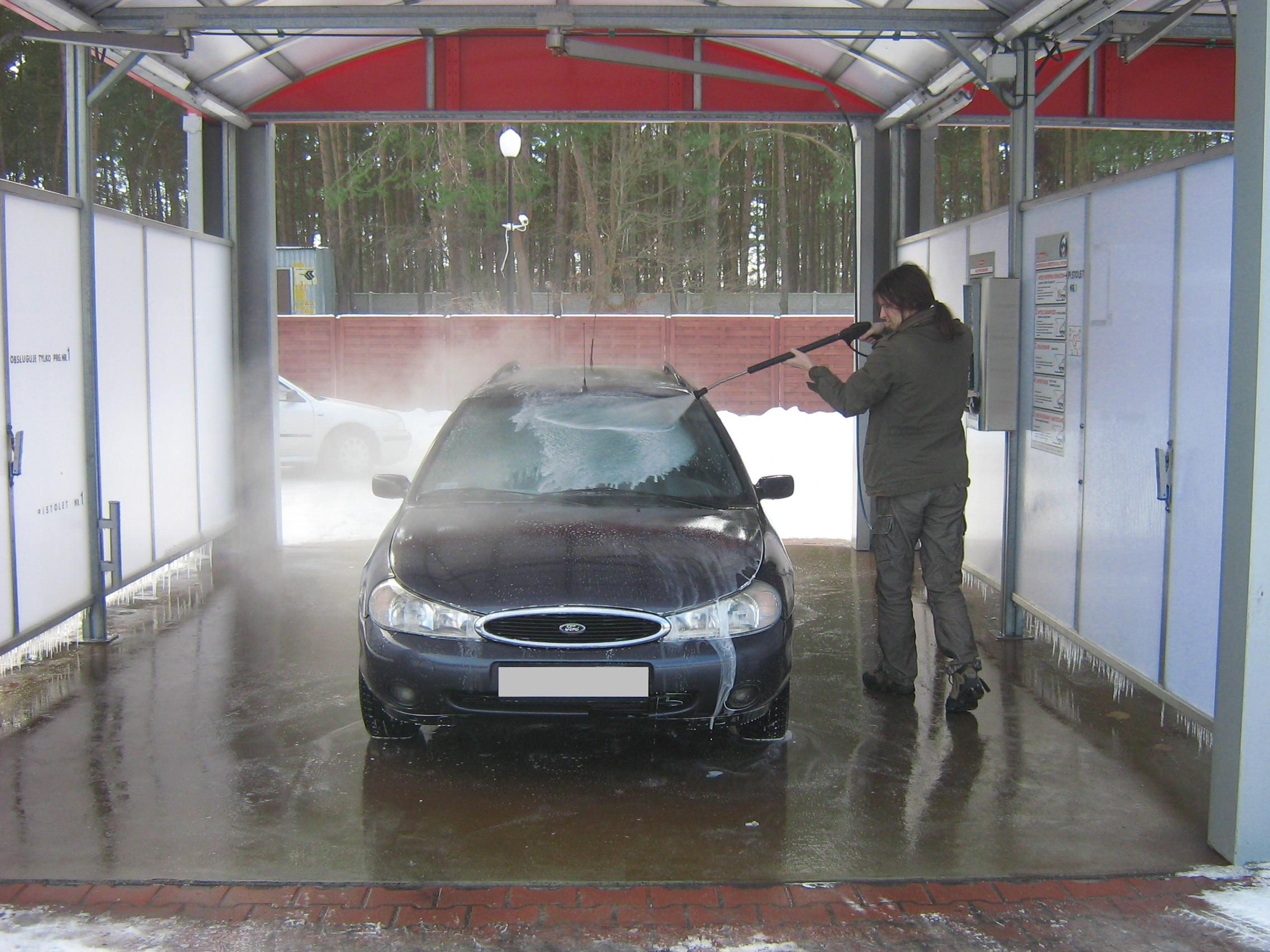 Myjnia bezdotykowa w Świnoujściu (ul. Karsiborska)